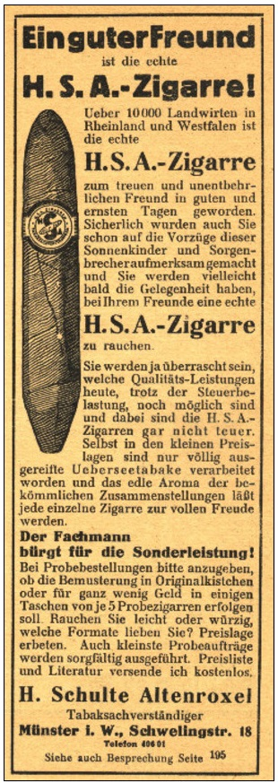 HAS Werbeanzeige